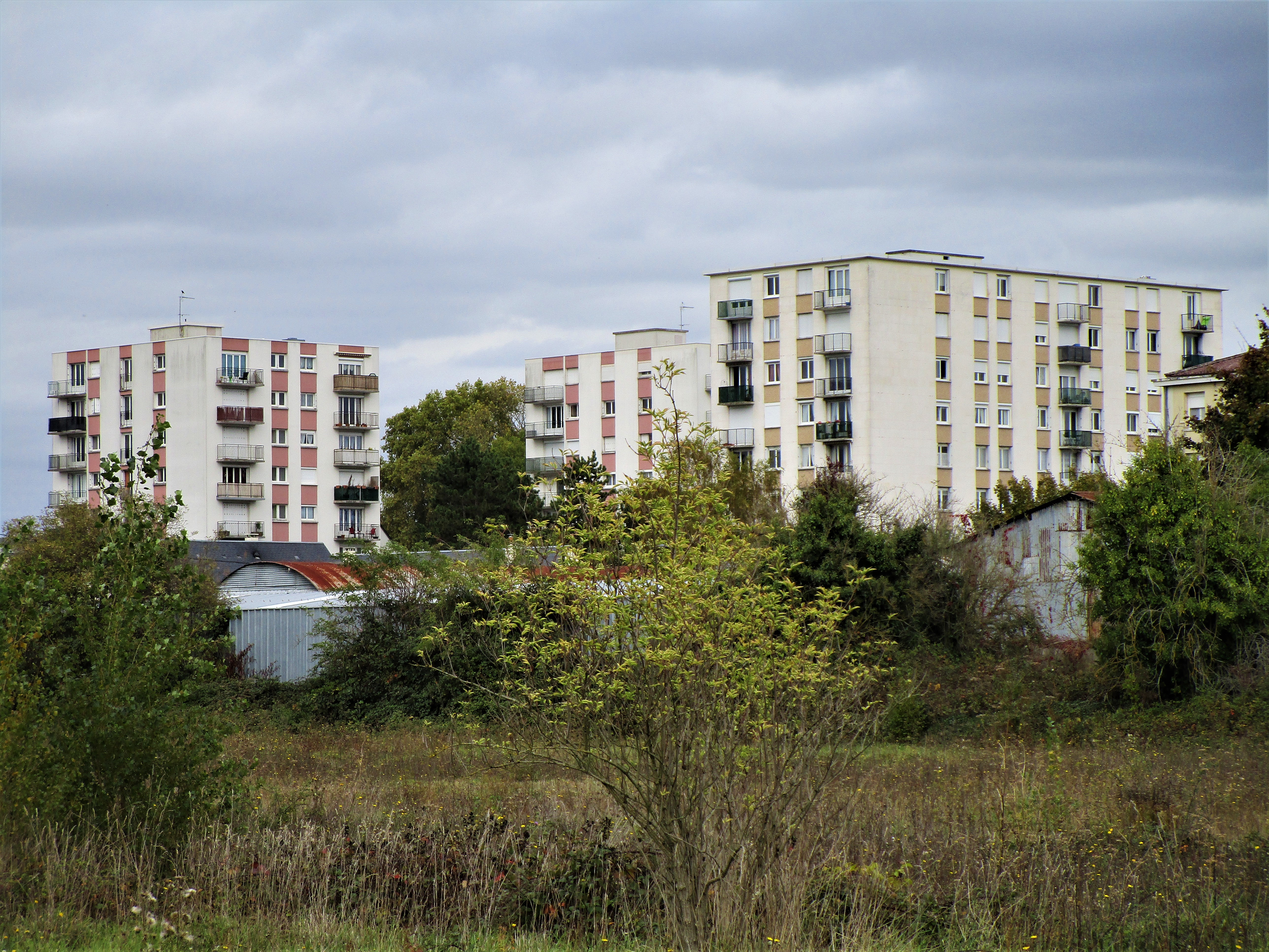 Friche de la rue Ligner au premier plan, et grand ensemble de la rue Saint-François, commune de La Riche, en octobre 2017.